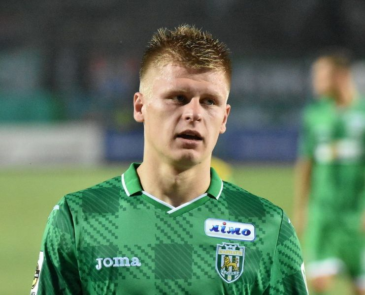 Вадим Страшкевич - український футболіст